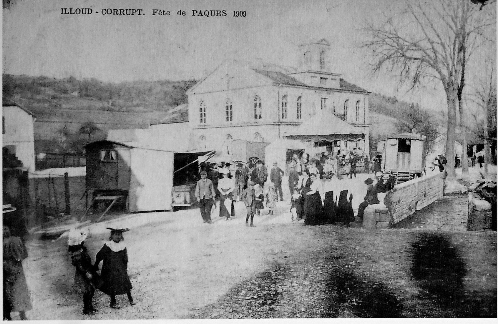 par une vue du début du XXe siècle.